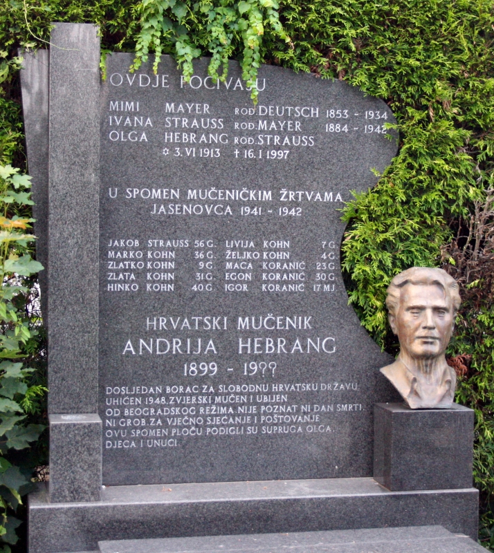 grob Andrije Hebranga na Mirogoju u Zagrebu